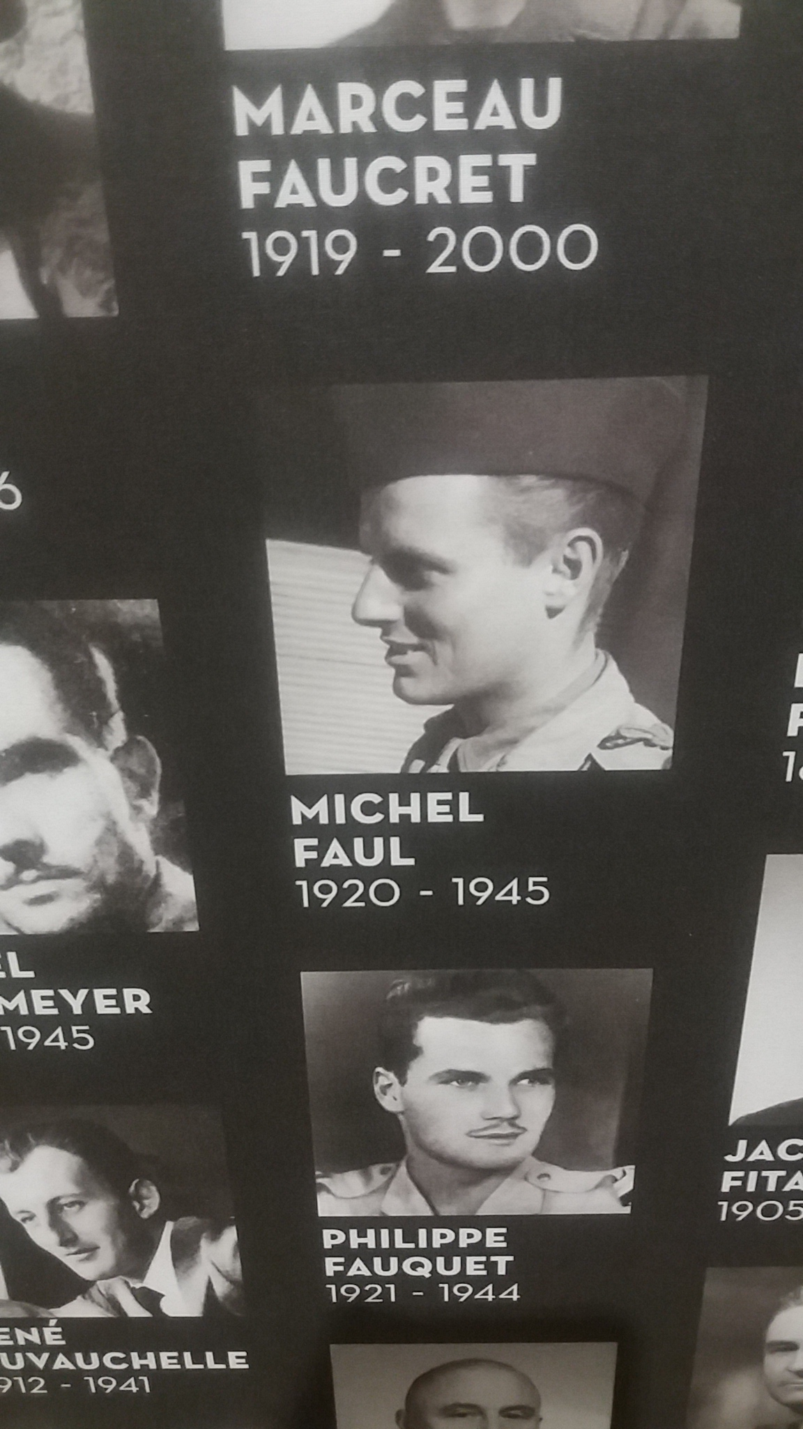 Tableau figurant au Musée de la Libération , hôtel des Invalides, Paris